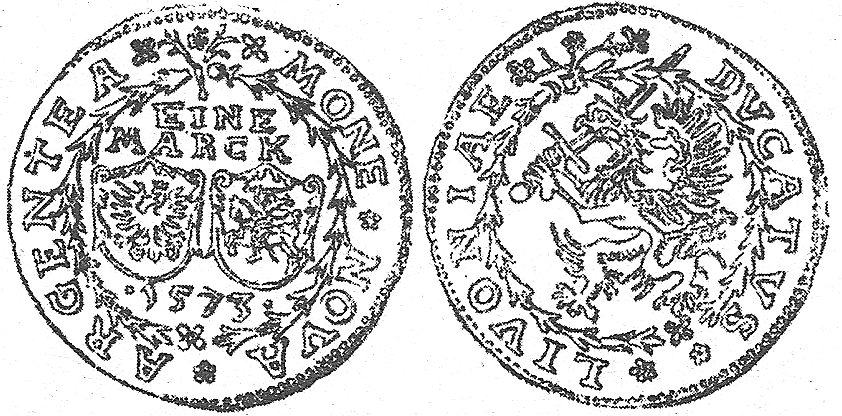 Marka kurlandzka z 1573r